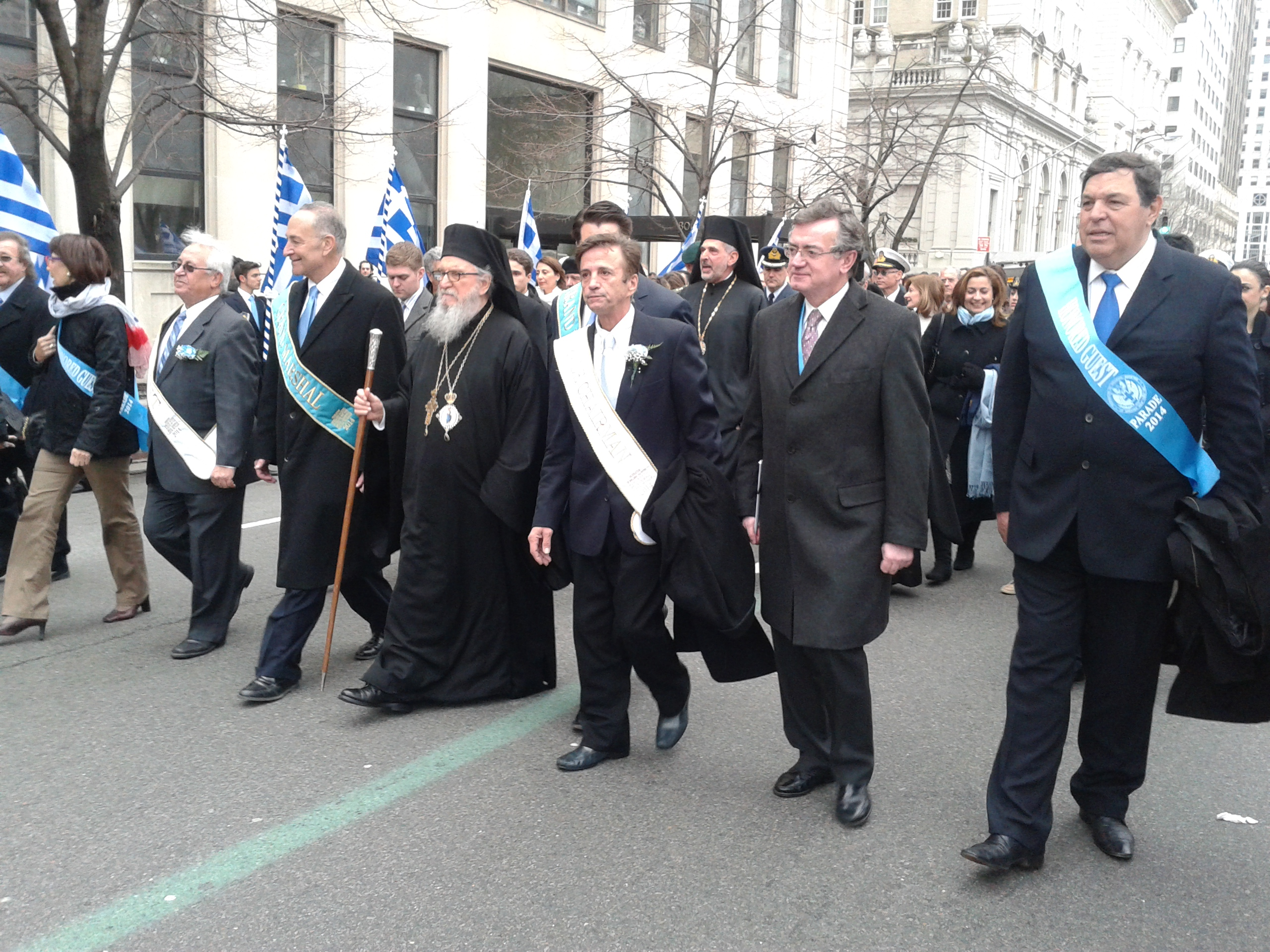 Επίσκεψη ΥΦΥΠΕΞ Κ. Γεροντόπουλου στις Ηνωμένες Πολιτείες Αμερικής